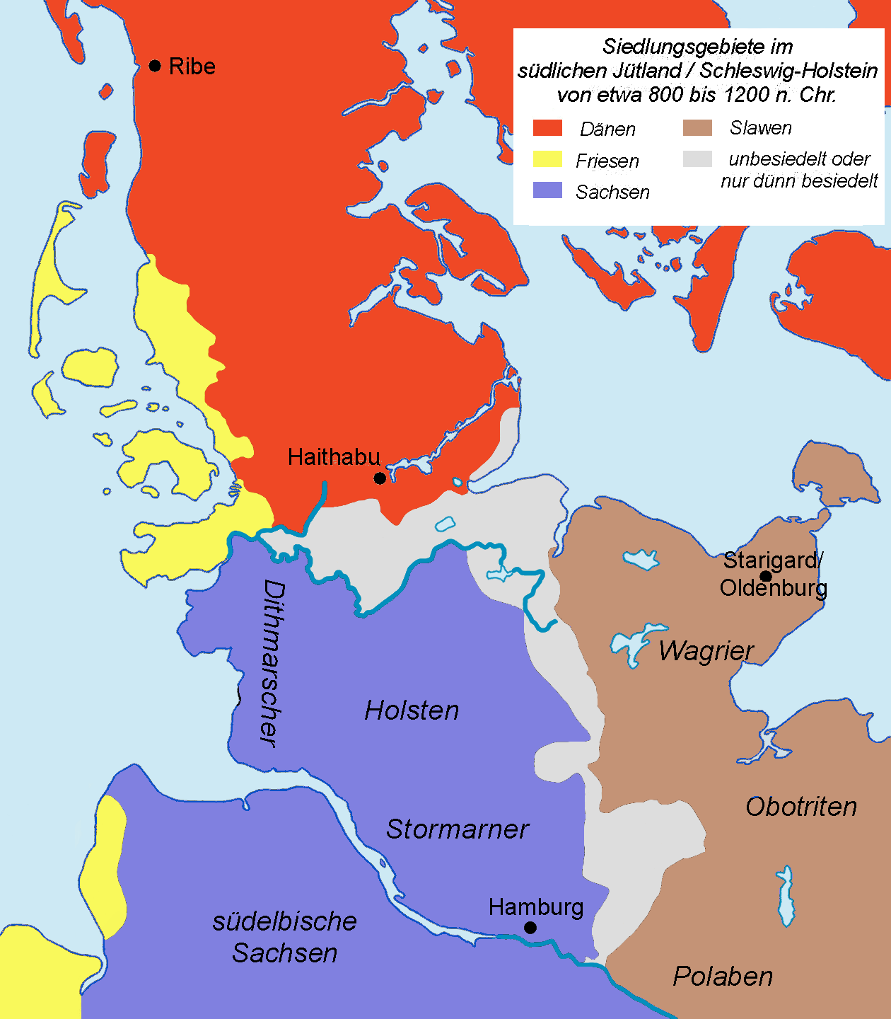 Siedlungsgebiete im südlichen Jütland / Schleswig-Holstein von etwa 800 bis 1100, Quellen: 1) "Siedlungsgebiete vom 9. bis 11. Jahrhundert" in: Historischer Atlas Schleswig-Holstein vom Mittelalter bis 1867, Neumünster 2004. 2) Peter Ilsøe: Nordens Historie, København 1936; Anmerkung: Küstenlinie nur annähernd, Stand etwa frühe Neuzeit (mit Text)